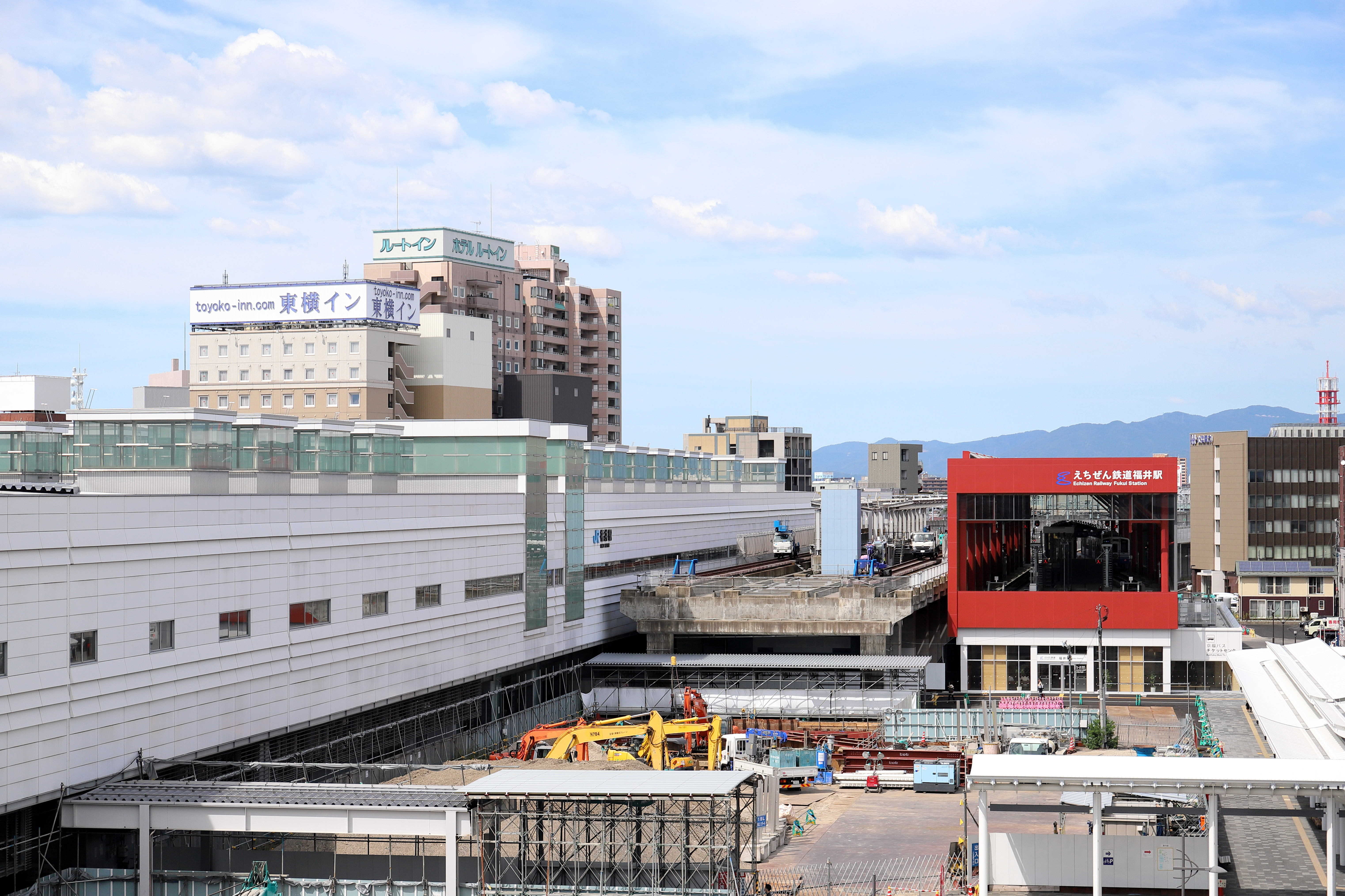 JR福井駅東口(えちぜん鉄道 福井駅高架完了後)の風景